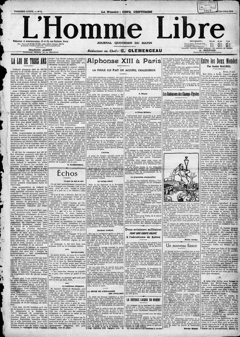 Première page du numéro 4 de L'Homme libre.